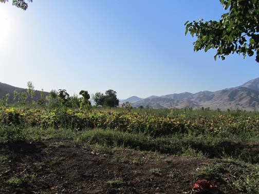 نمایی از مزرعه های قزقلعه